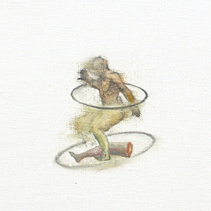 Kreistraining (Hans Georg Koehler)